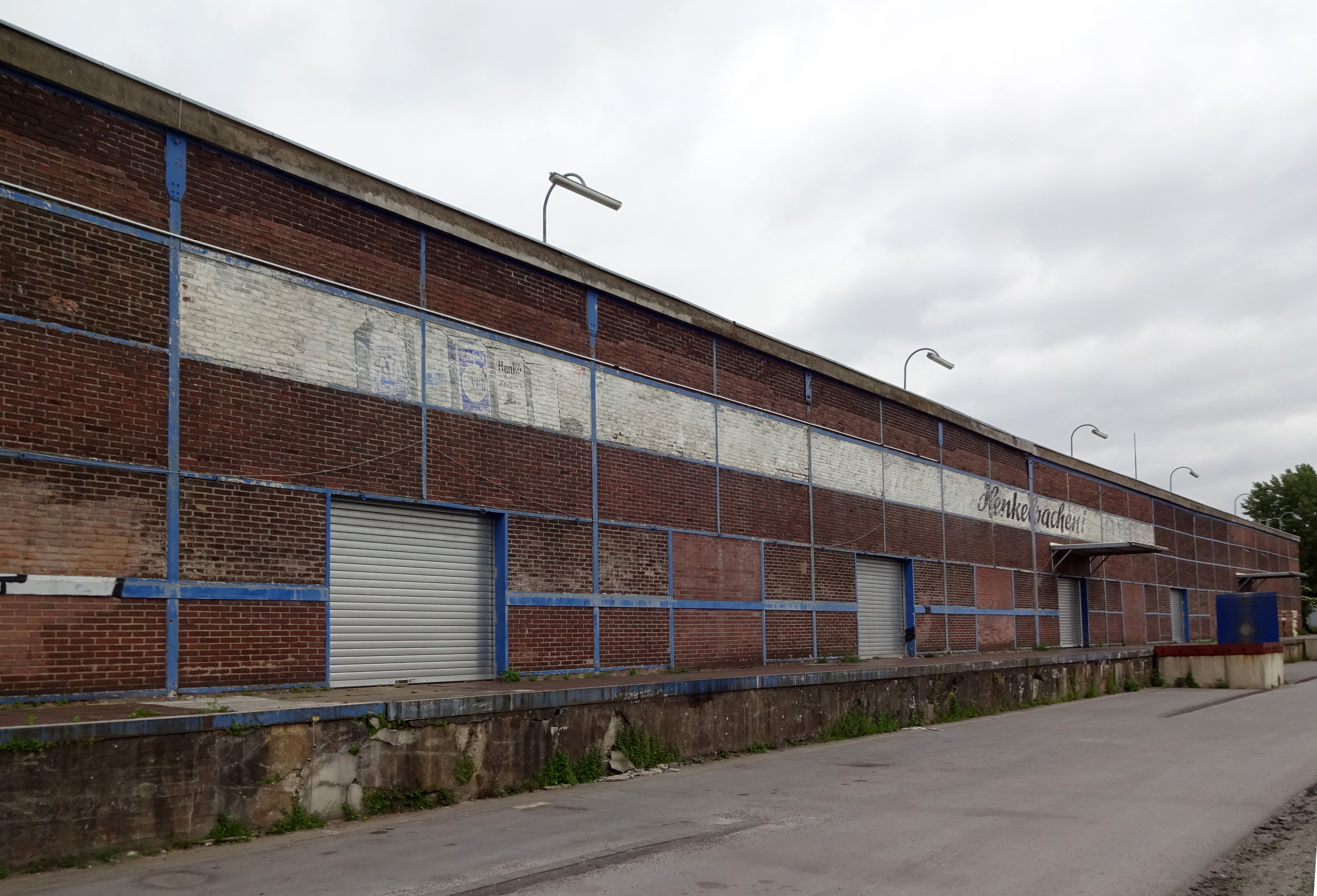 Henkel Werbung – Rampe Reisholzer Hafen, Reisholzer Werftstraße 75, Düsseldorf-Holthausen